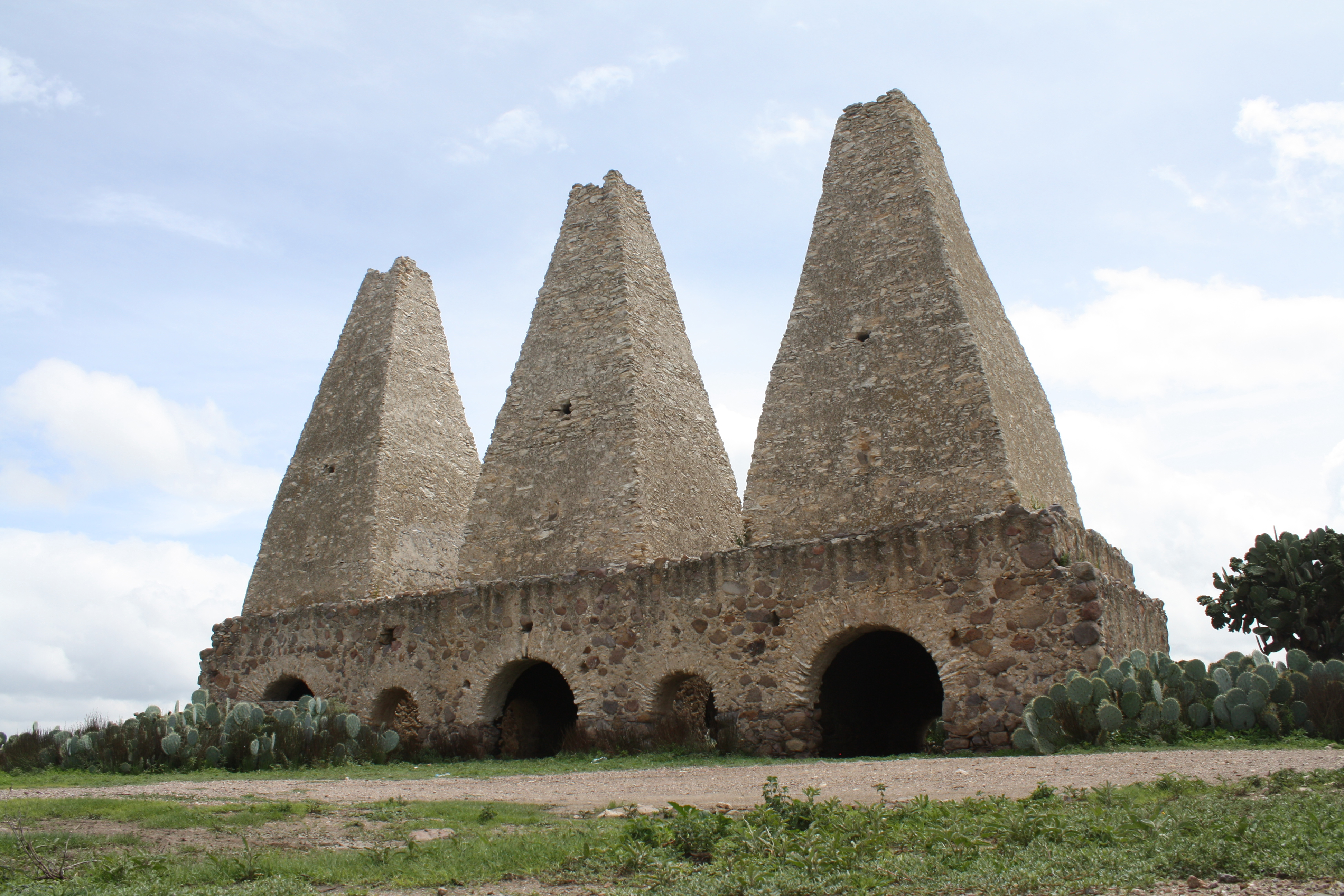 Hornos Jesuitas, Mineral de Pozos, San Luis de la Paz, Guanajuato